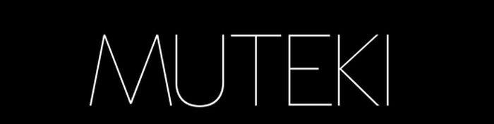 「MUTEKI」ブランドロゴ